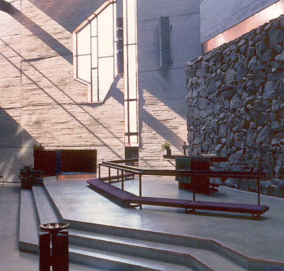 Espoonlahden kirkko. Alttarialue. Espoo, Finland.